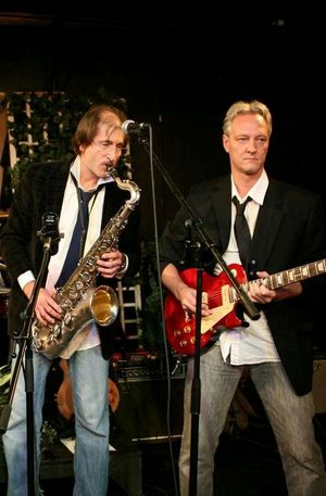 A Harmadik Figyelmeztetés színészzenekar 2009-ben.A képen balról jobbra: Cserna Antal és Fillár István